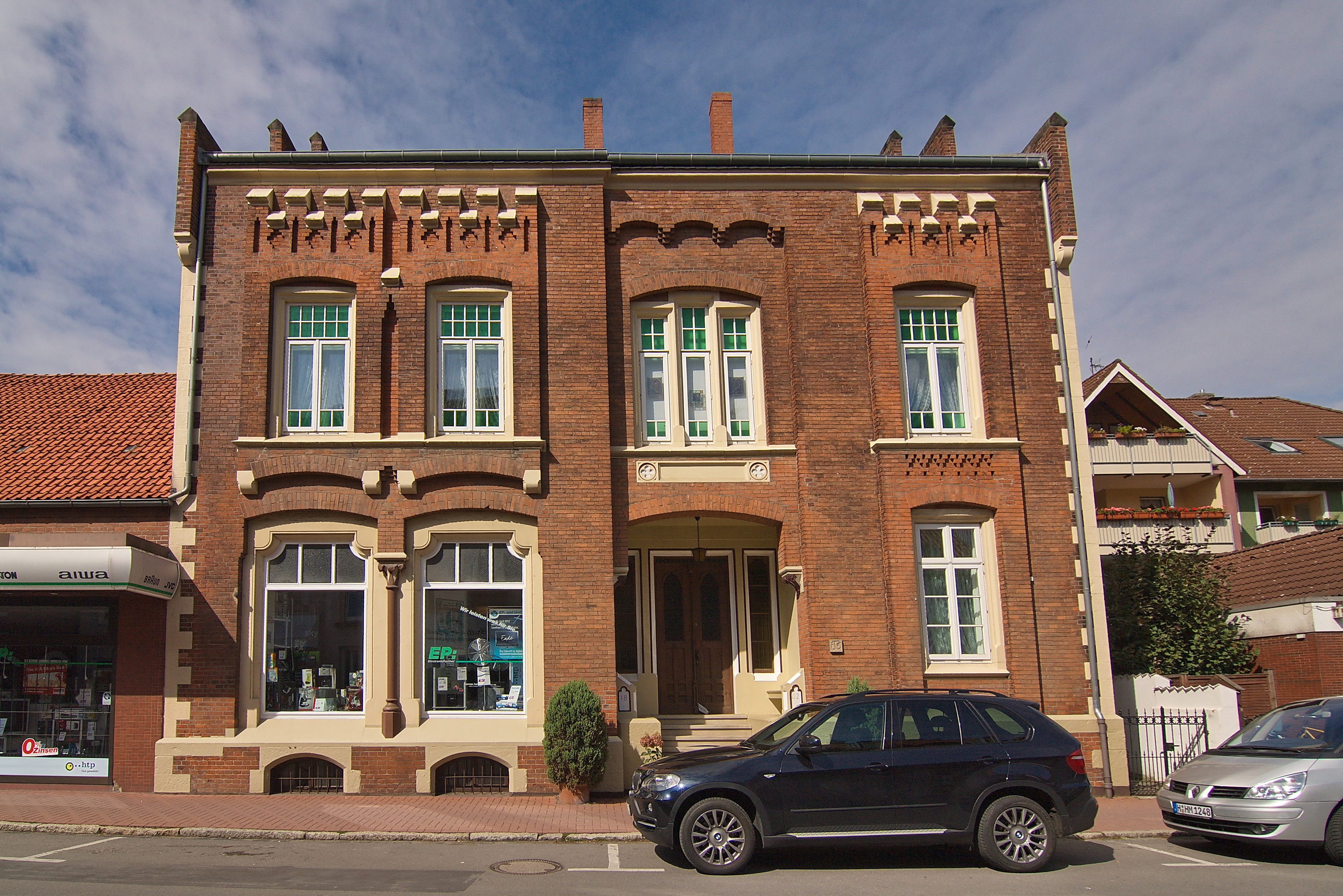 Wohn- und Geschäftshaus von 1862 in Wennigsen, Niedersachsen, Deutschland